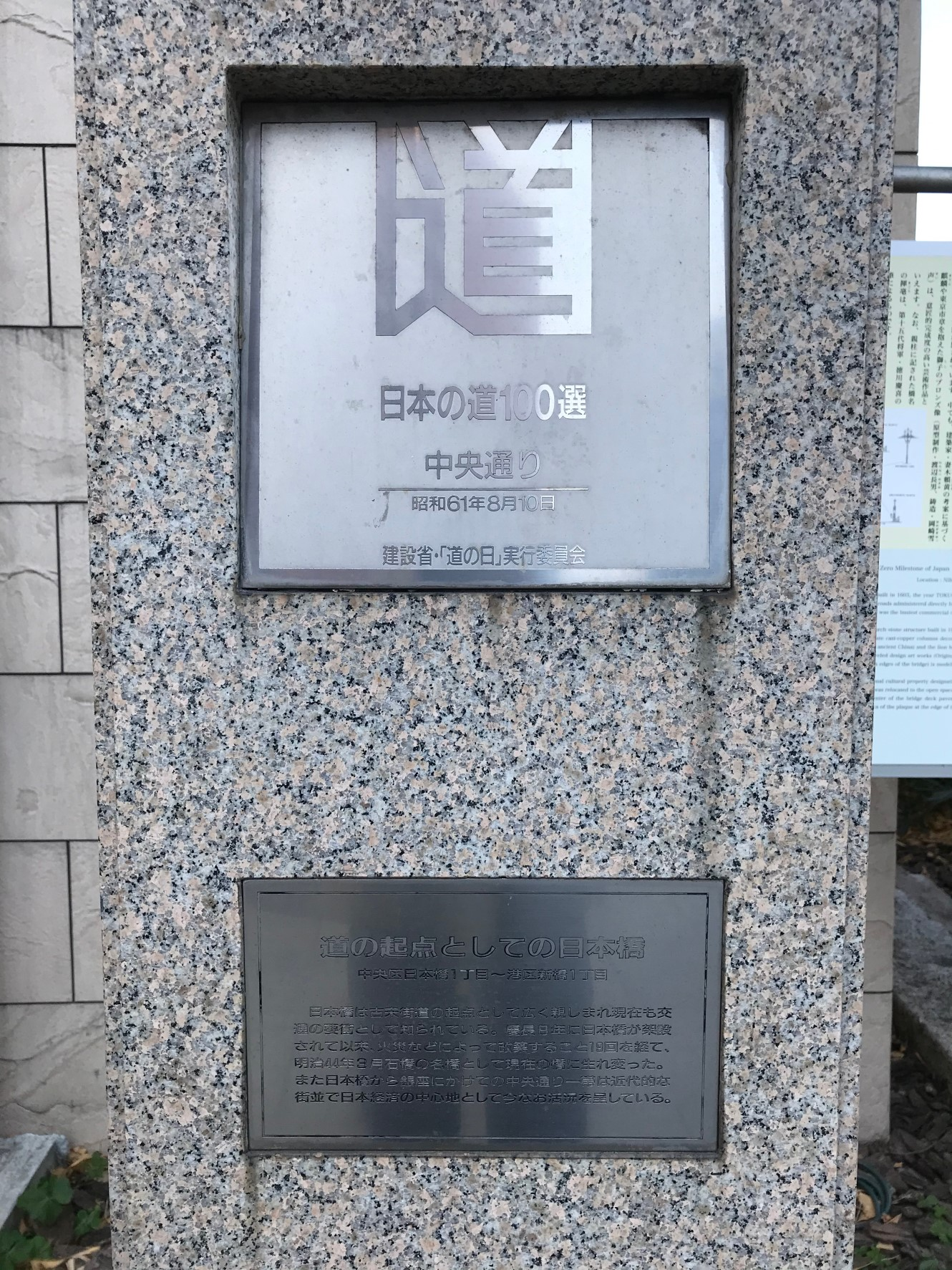 Wikipedia:ja:中央通り (東京都)が日本の道100選に登録されたことを意味する標識。